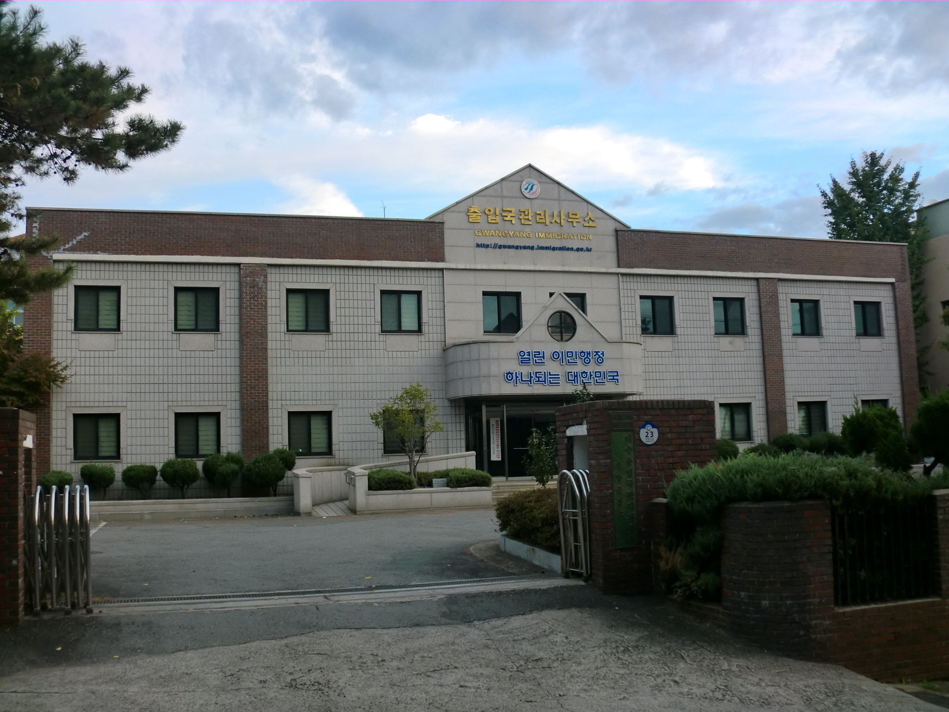 전라남도 광양시에 있는 여수출입국관리사무소광양출장소